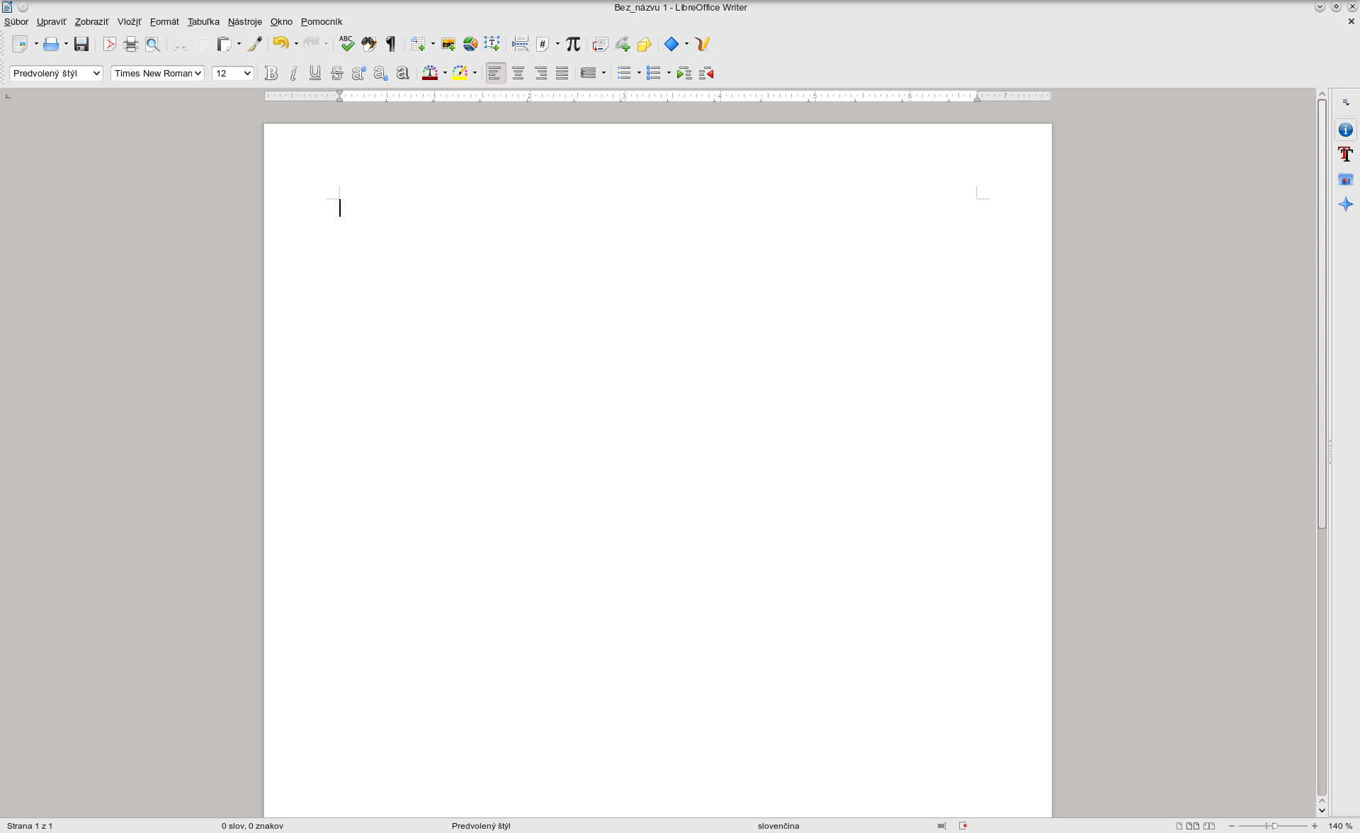 LibreOffice Textový dokument